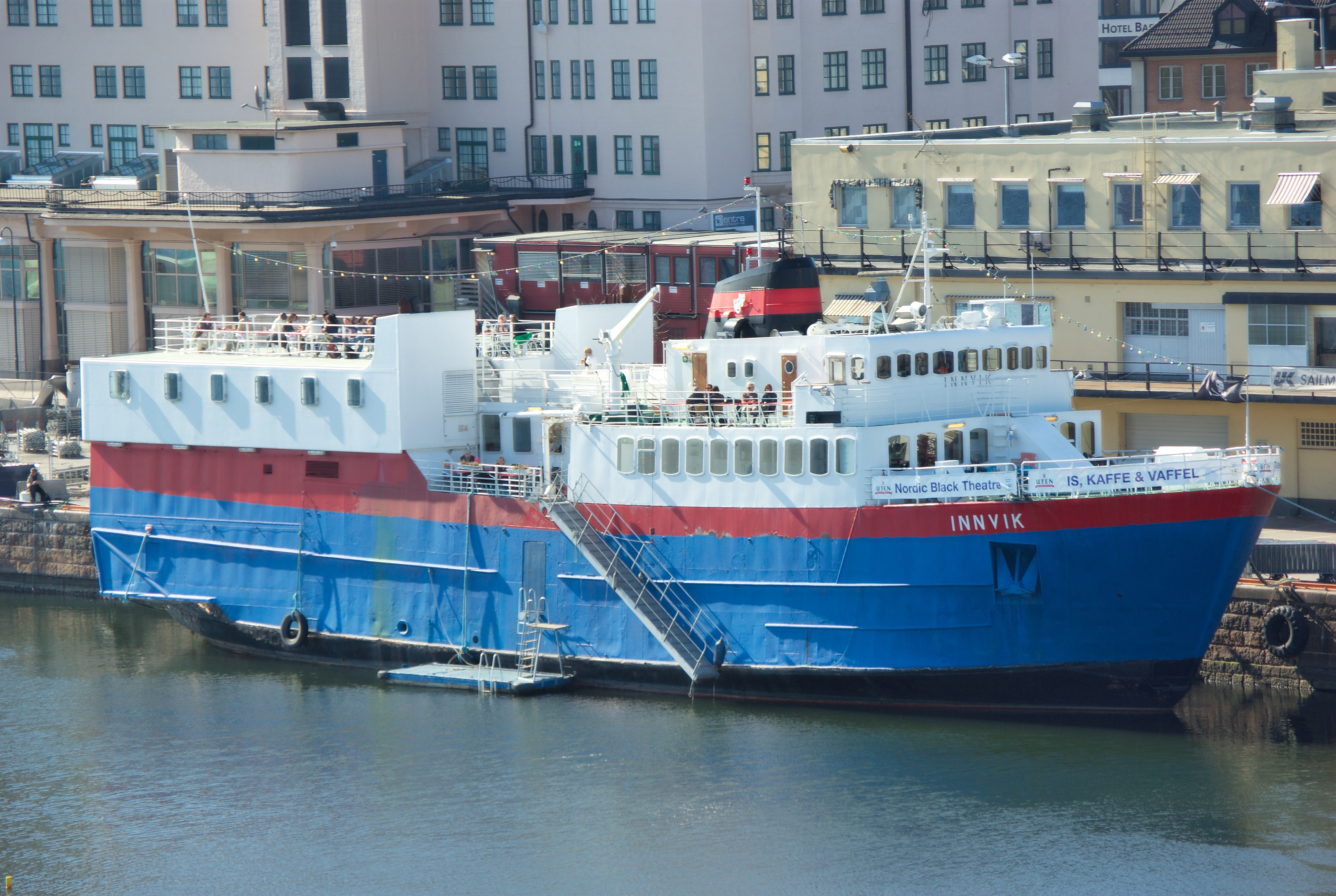 Norsk (bokmål): Teaterbåten i Bjørvika.